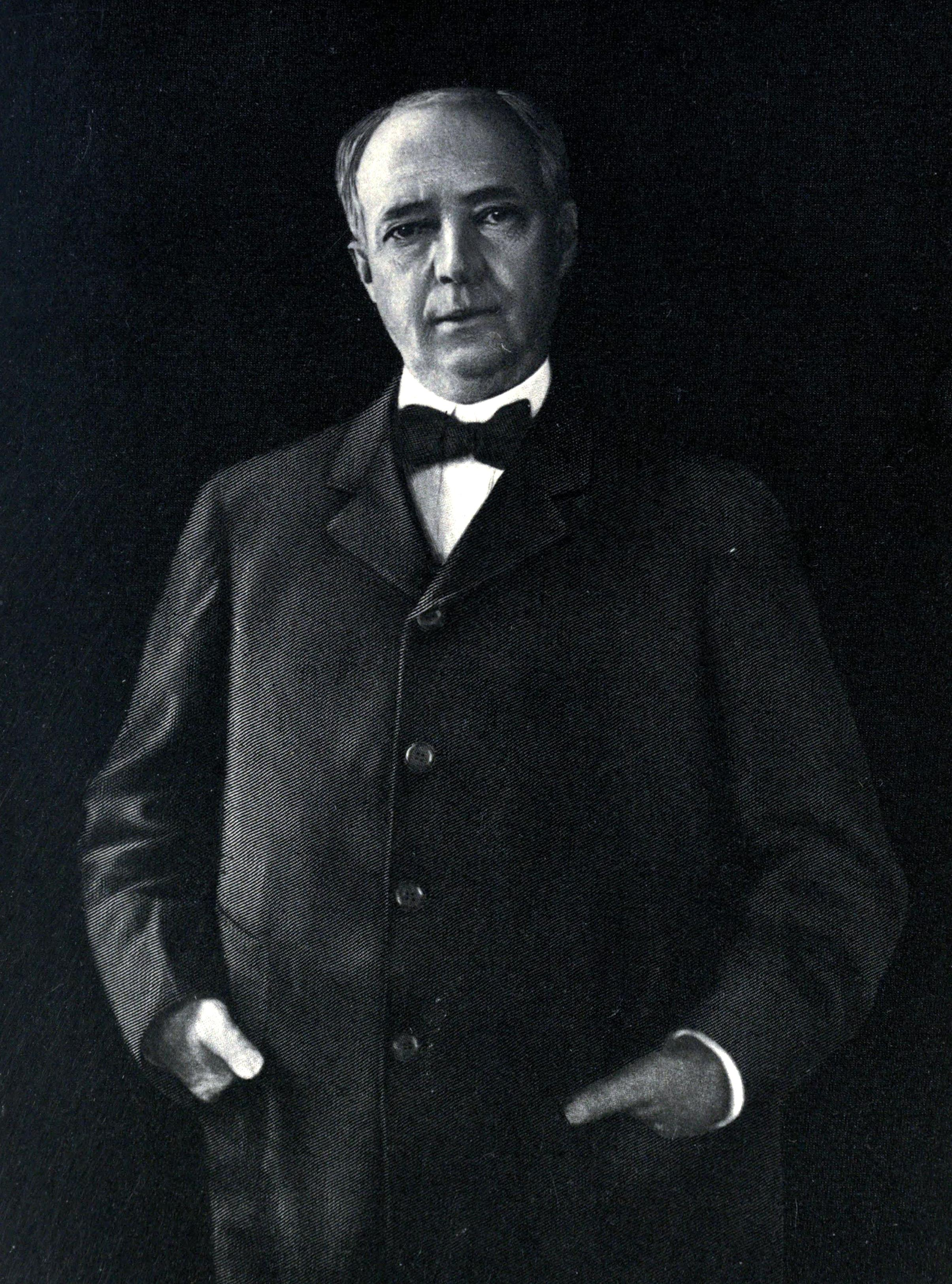 John Dustin Archbold